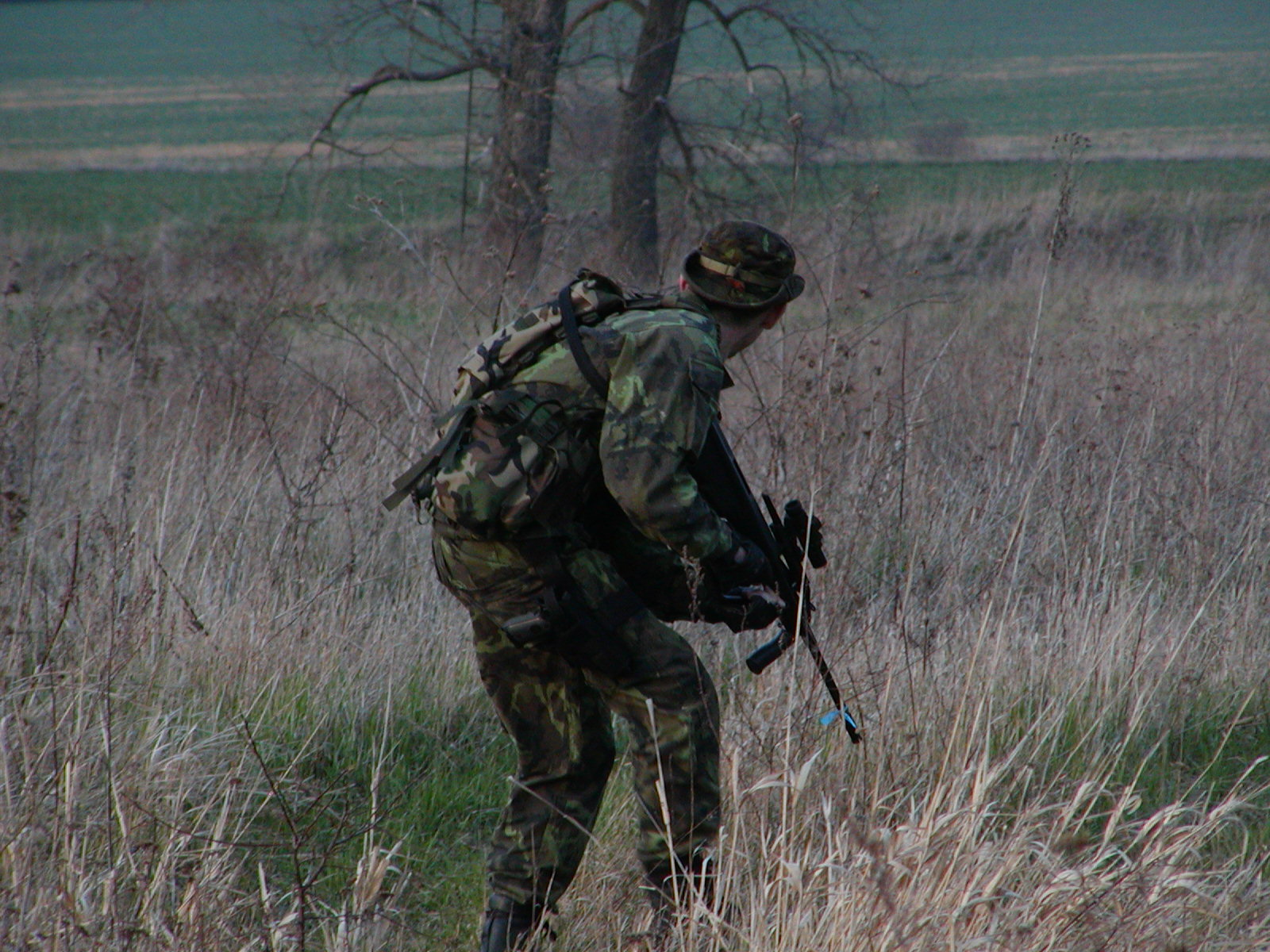 Fotografie zachycuje jednoho ze hráčů hry airsoft, během bojového přesunu a prohledávání přilehlých oblastí k herní ploše.